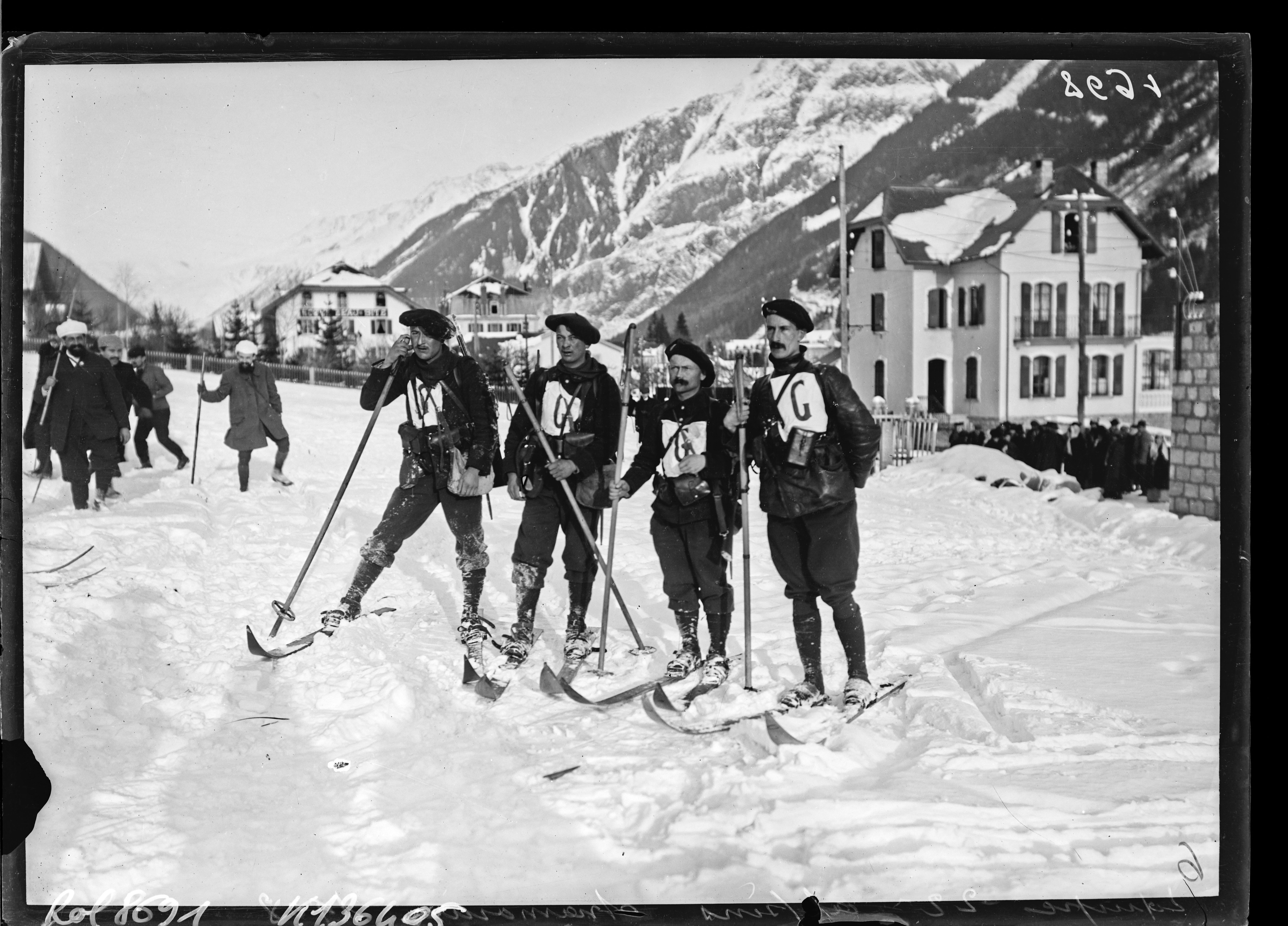 Équipe du 22e [chasseurs-]alpins, Chamonix, 1908 [à ski, Championnat international du 3 au 19 janvier] : [photographie de presse] / [Agence Rol]